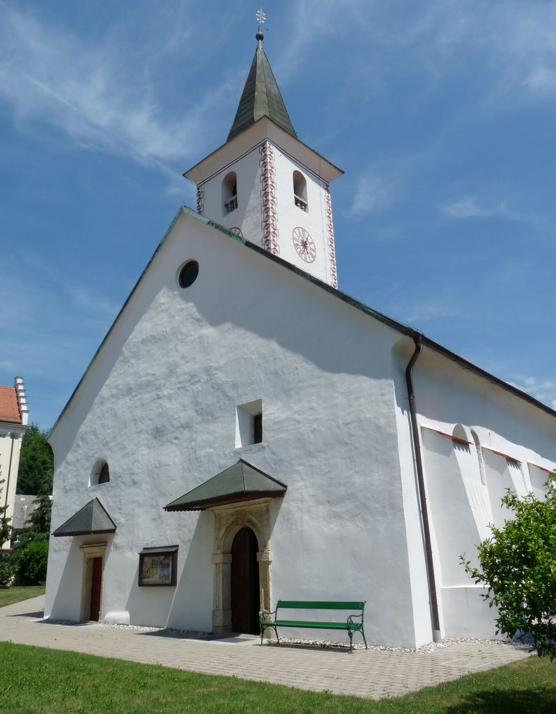 Loka pri Zidanem Mostu